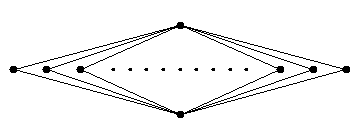 subgroup lattice of a Tarski group